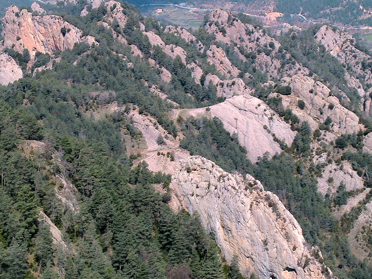 Des dels cingles de Busa, el tall d'una pista, al centre de la foto, marca la situació del Coll de la Maçana enmig d'un mar de merlets.